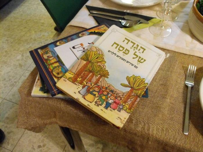 מגוון הגדות של פסח לבחירת הנוכחים.